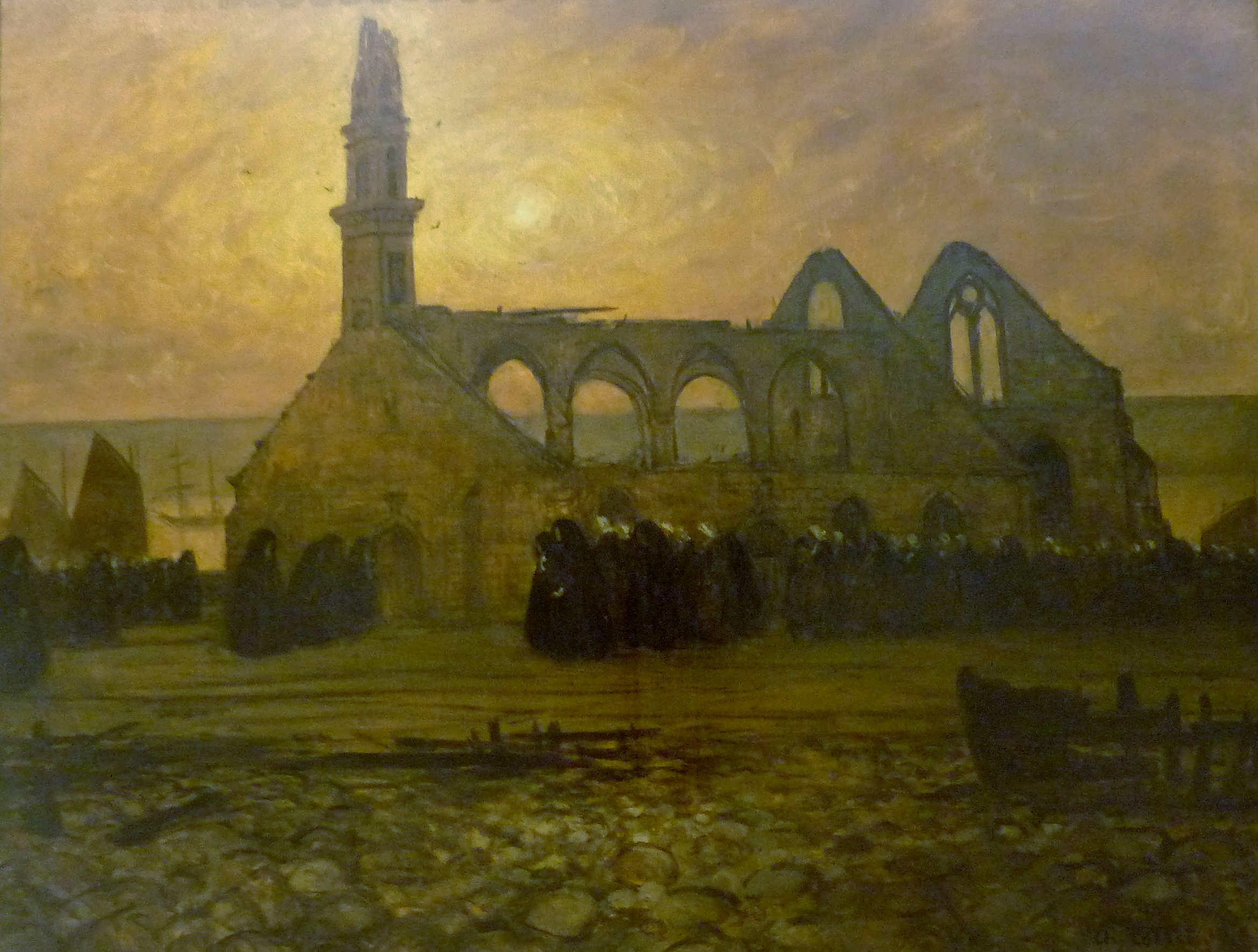 Il s'agit de la chapelle Notre-Dame de Rocamadour à Camaret-sur-Mer.